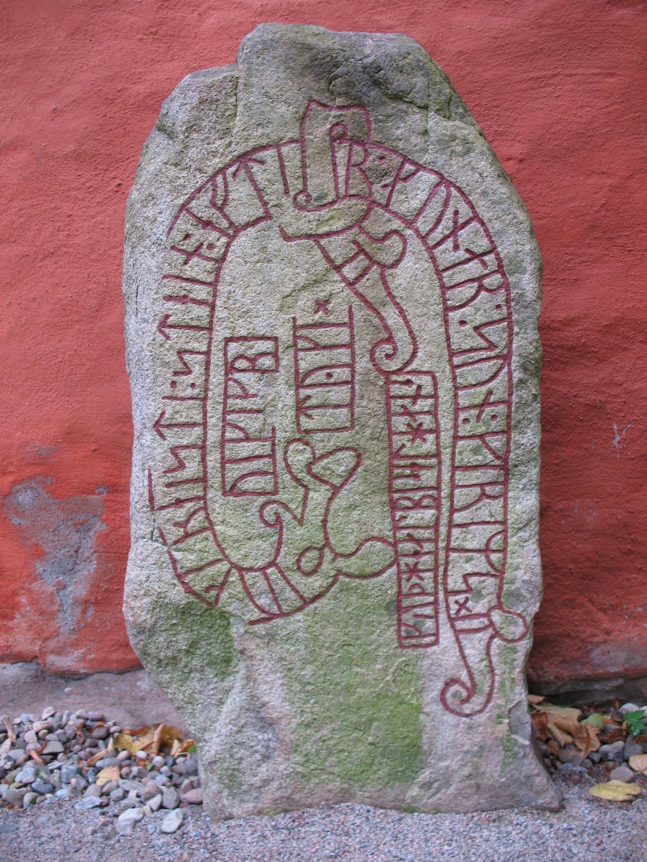 runestone Sm 10.